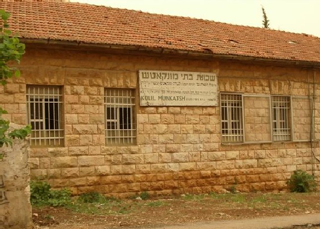 שלט בתי מונקאץ' רישיון נוצר על ידי משתמש:Motyka